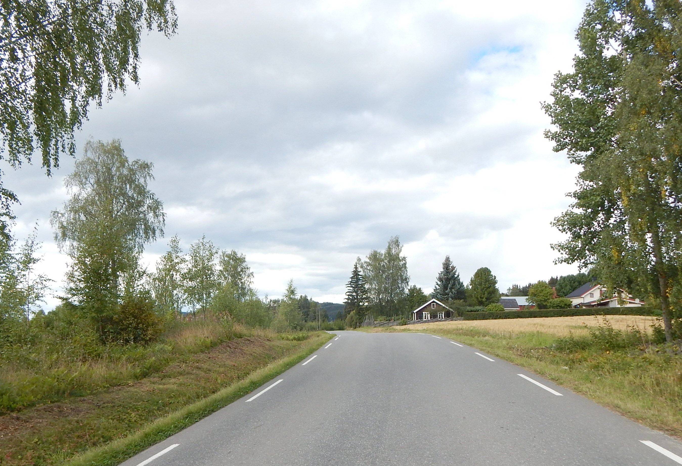 Løkendalsvegen (FV1782, tid. 93) i Veldre